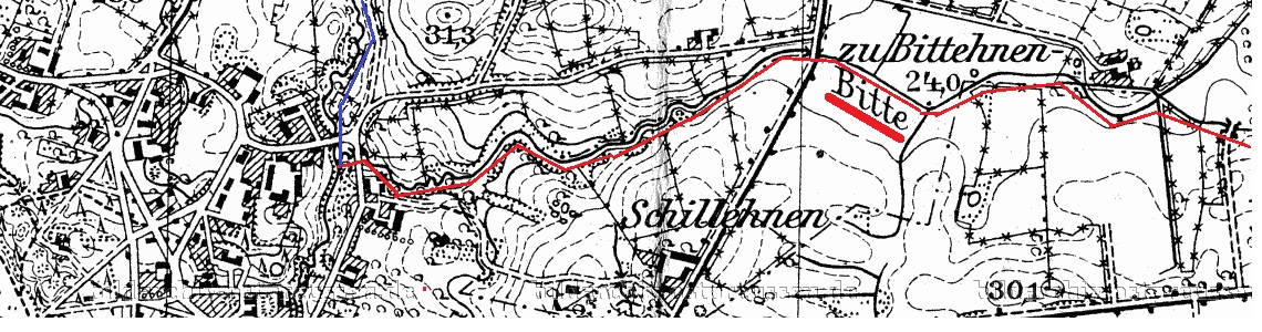 Raudona spalva pažymėta pavaizduota Bitės upelio vaga, mėlyna - aukščiau aprašyta vaga